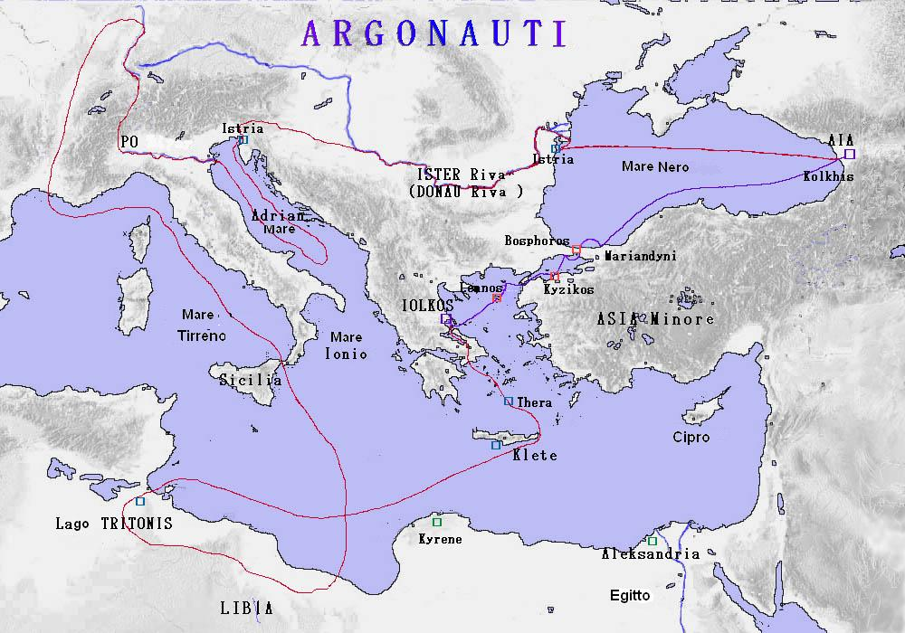 Creata originalmente da Maris stella, bg-map Descrizione copyrights (original) di Maris stella background map : modification of this map di Captain_Blood under GFDL Created by Uploader (Maris stella) usando un programma di disegno Date of creation : Gennaio 10, 2008 Size : 160,066 Bytes, 1000×700 pixels Informazioni: Una delle rotte possibili intraprese dagli argonauti